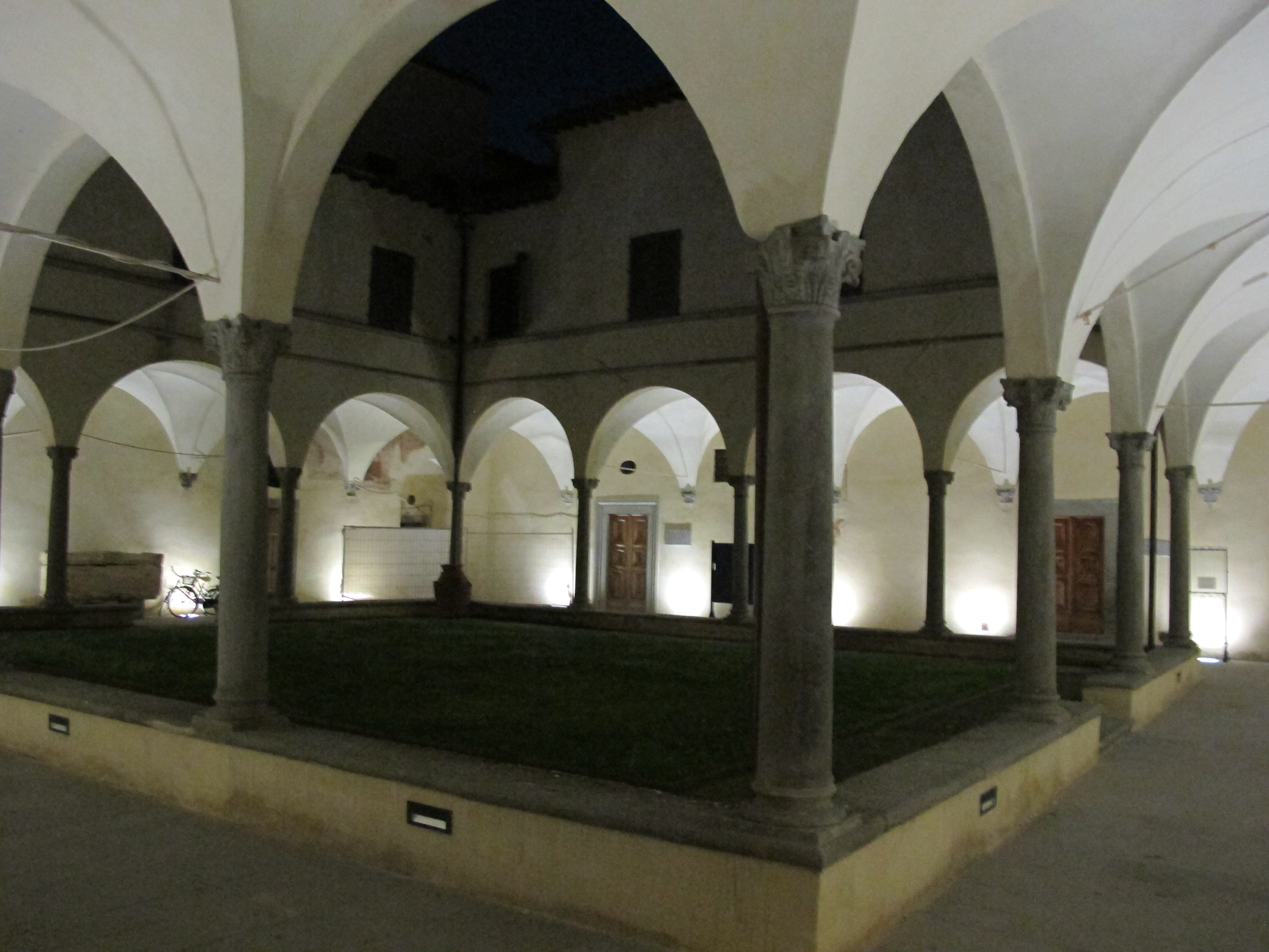 Montevarchi, chiostro di cennano